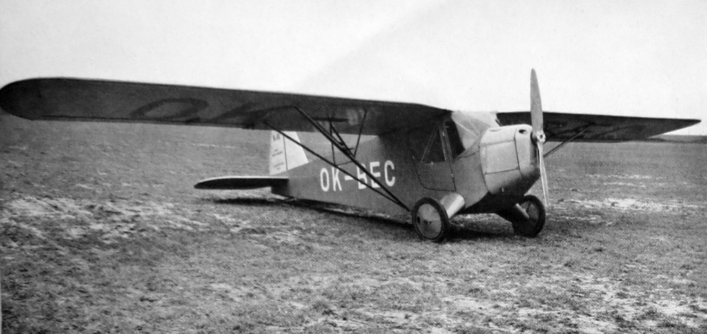 Walter Mikron a Beneš-Mráz Be-60 Bestiola (1935)